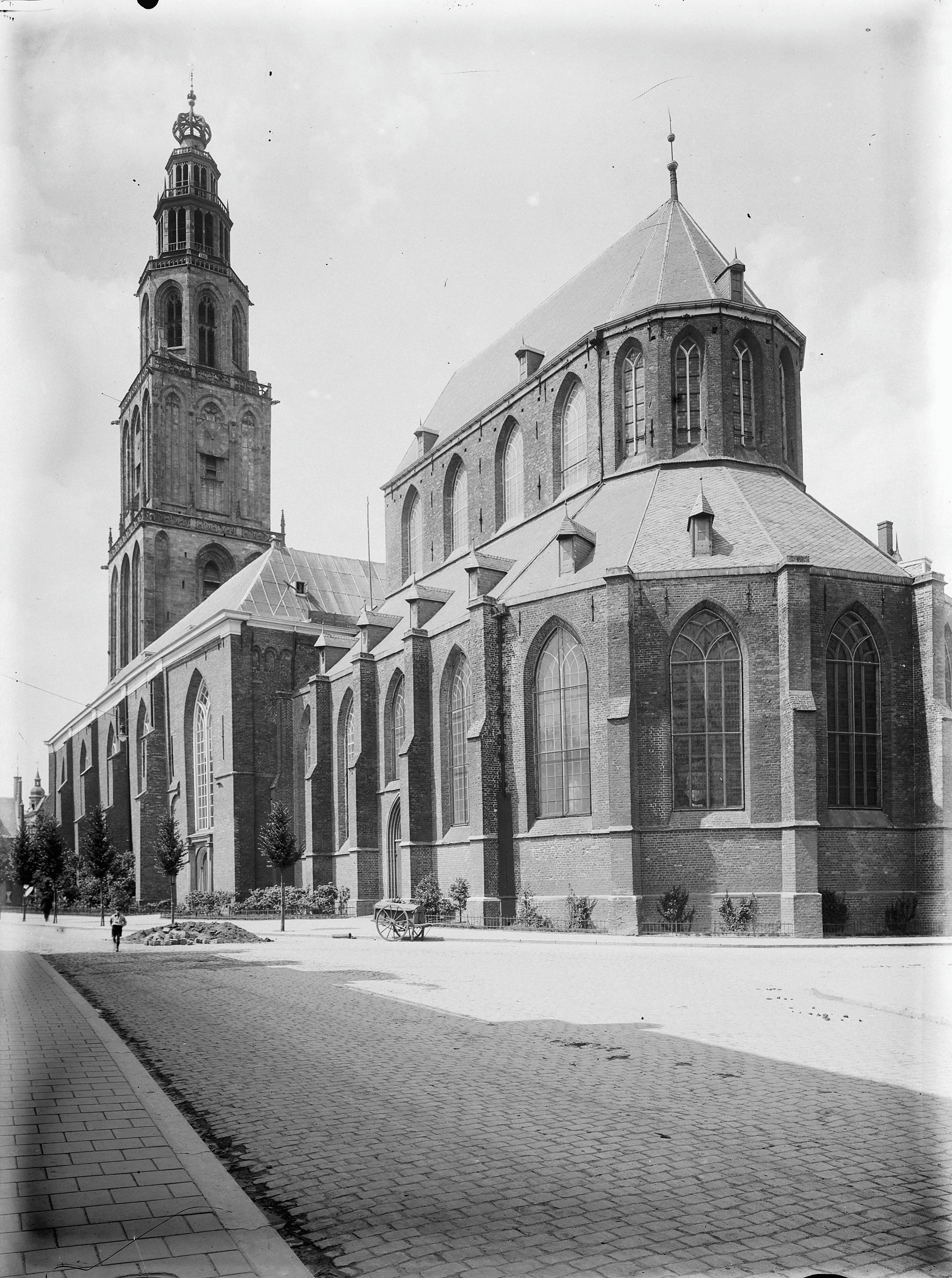 Martinikerk: Zuidoostgevel en toren (opmerking: In: Buiten ; 20(1926), nr. 44, p. 523)